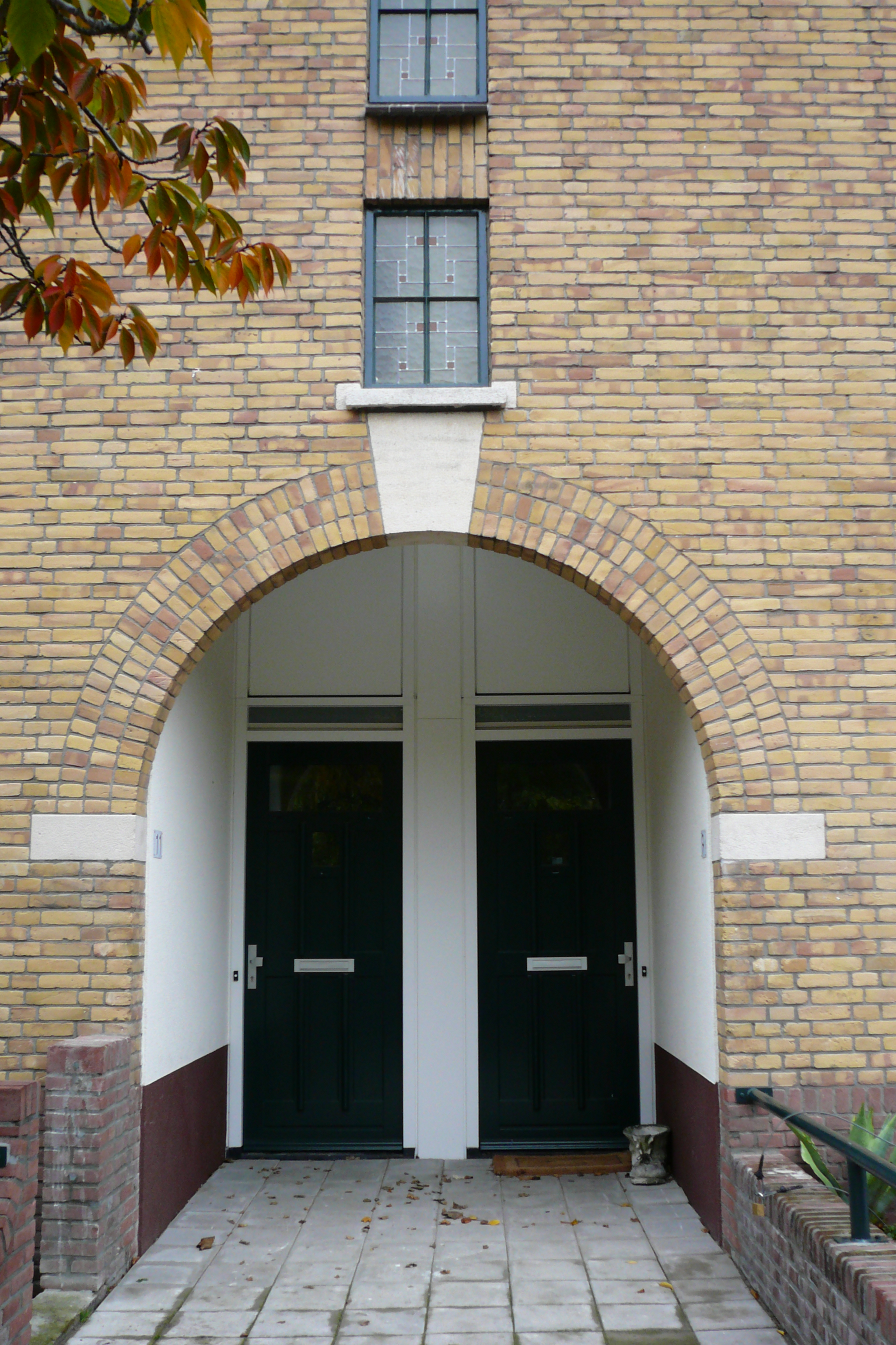 Esmoreitplein, Den Haag: vernieuwde portiek